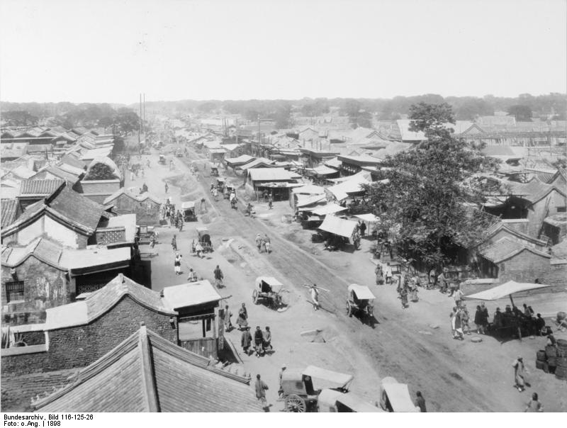 China 1898 Peking: Blick auf die Stadt vom Sonnentempel aus.